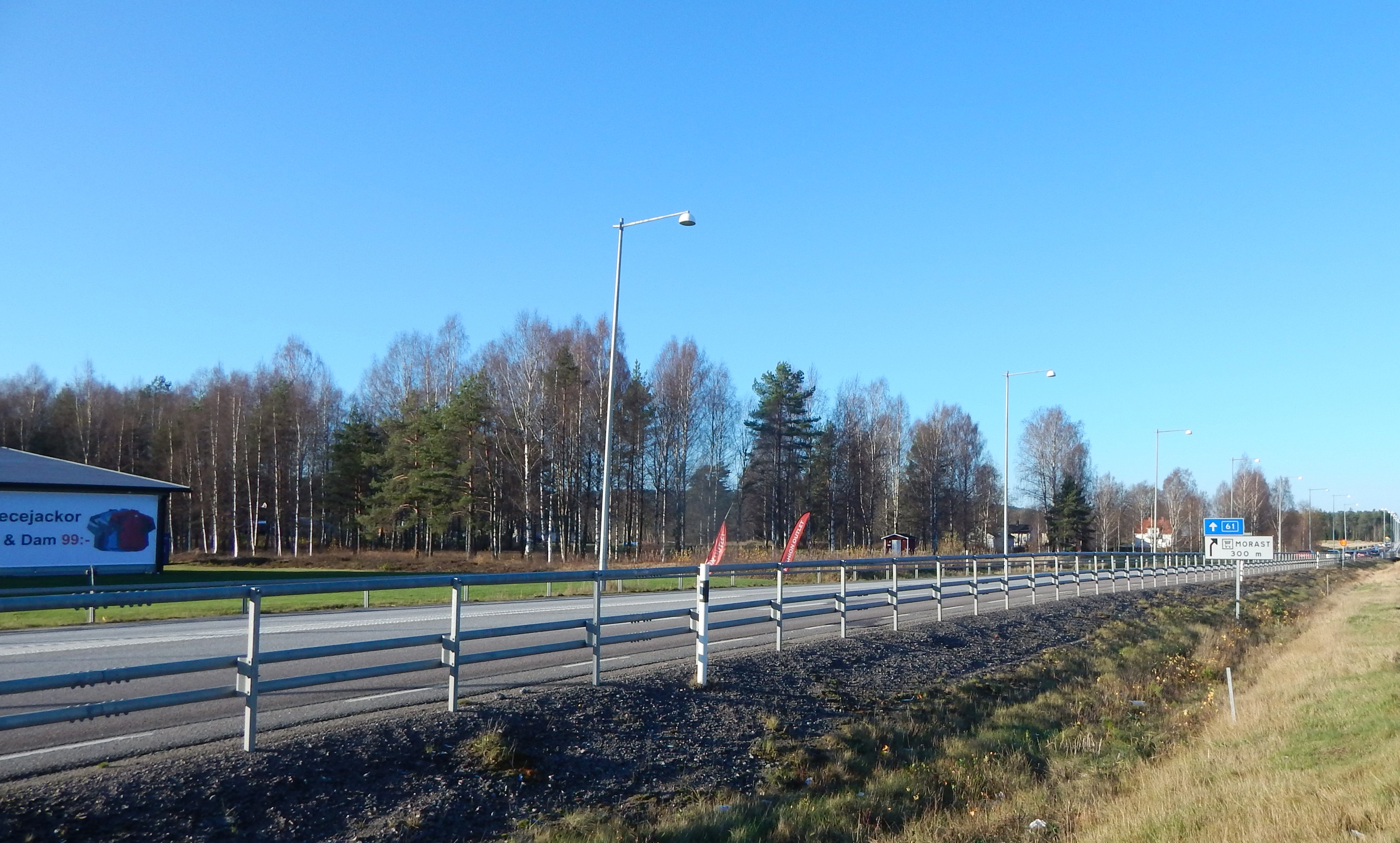 Svensk riksväg 61 utenfor Charlottenberg